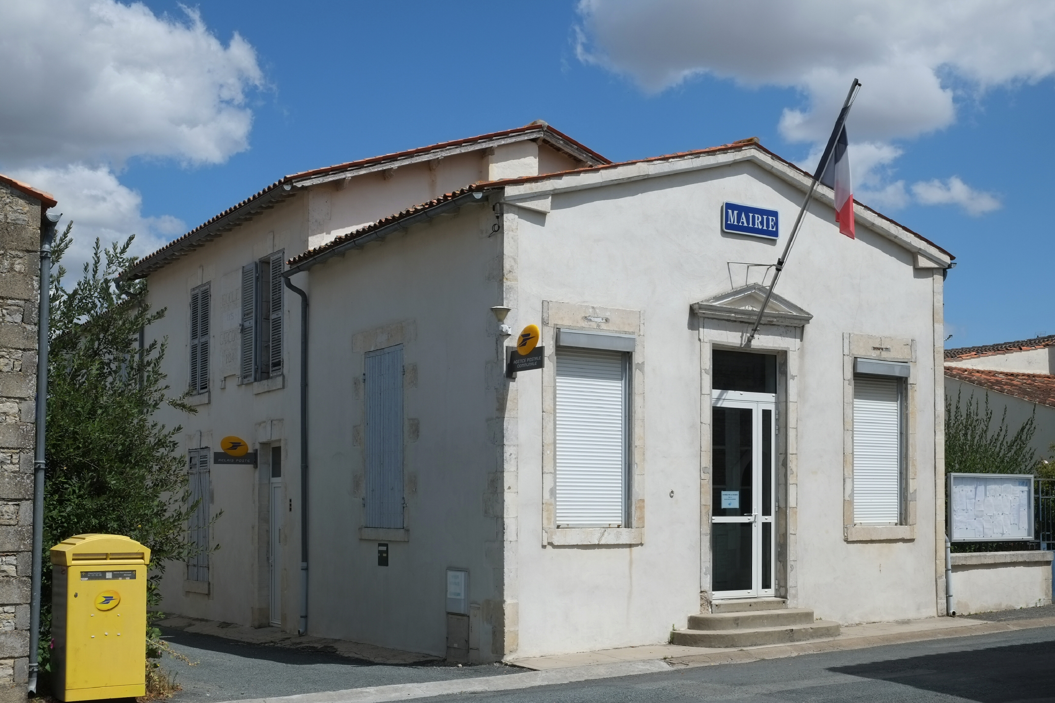 Mairie Nuaillé-d'Aunis Charente-Maritime France